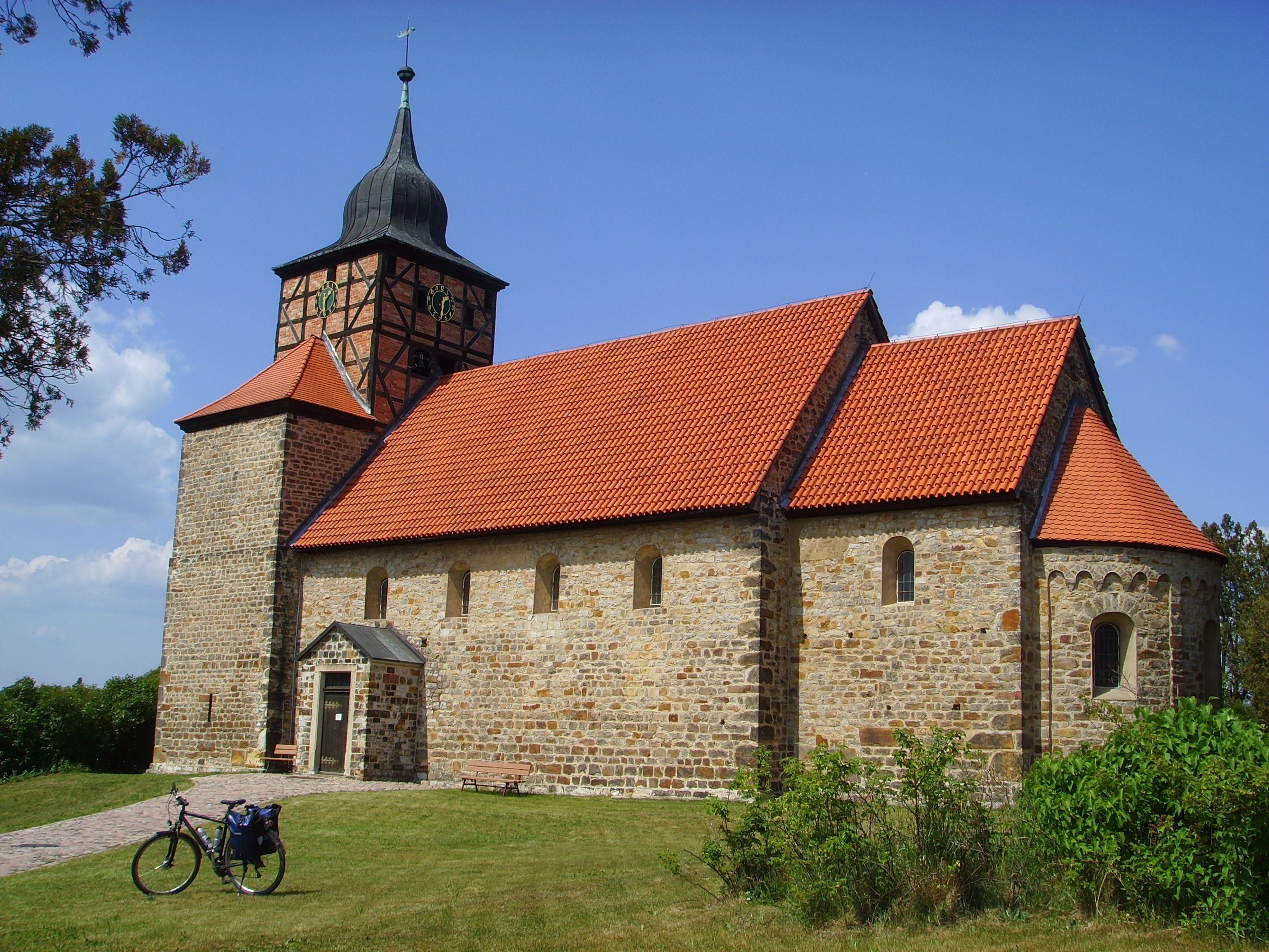 St.-Thomas-Kirche in Pretzien und mein Fahrrad